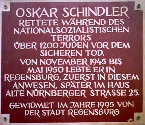 Bearbeitete Version von durch LSDSL Regensburg (Bayern): Gedenktafel für Oskar Schindler